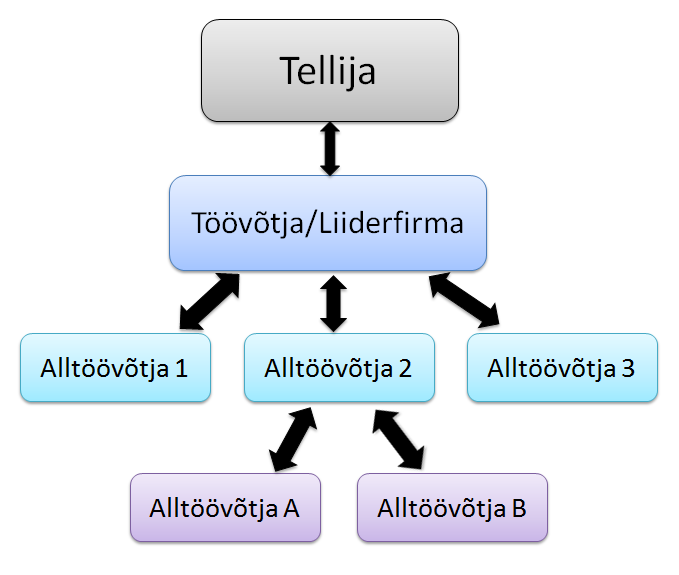 Töövõtu ahel kirjeldamaks tööandja, töövõtja ja alltöövõtjate seoseid